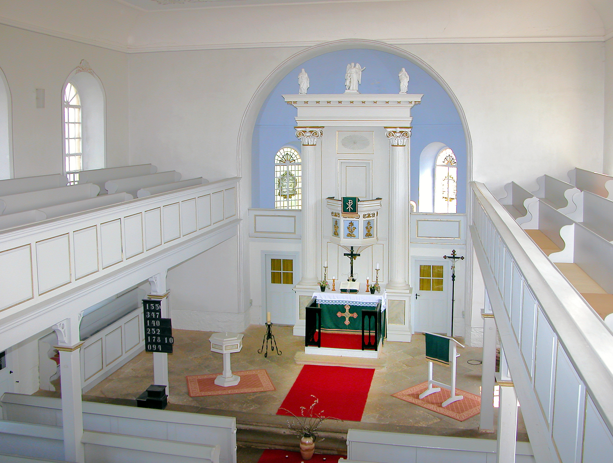 18.04.2011 04758 Ganzig (Liebschützberg): Evangelische Dorfkirche (GMP: 51.288522,13.183238) [DSCNn2322.TIF]20110418022DR.JPG(c)Blobelt